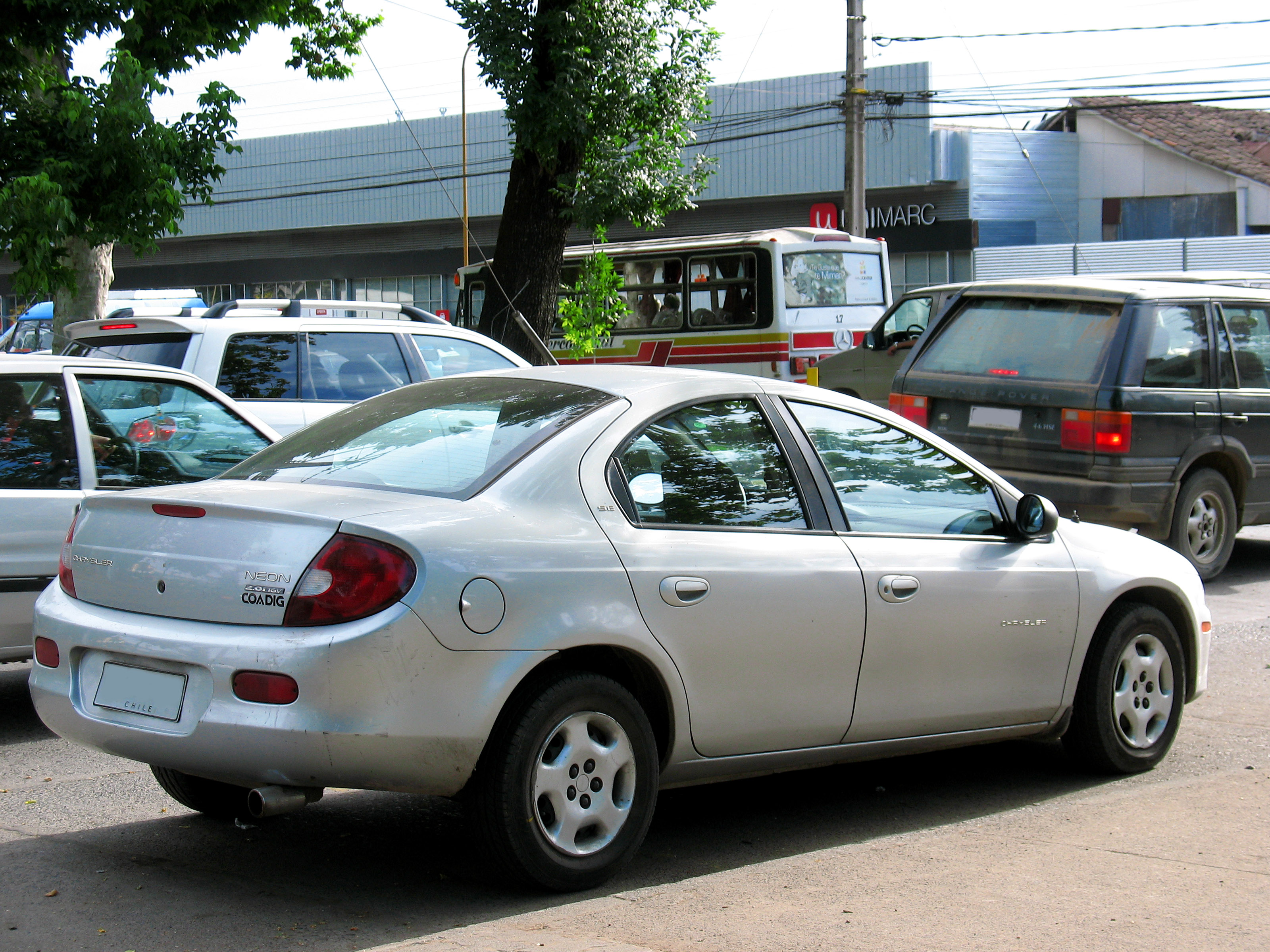 Dodge Neon 2.0i SE 2000